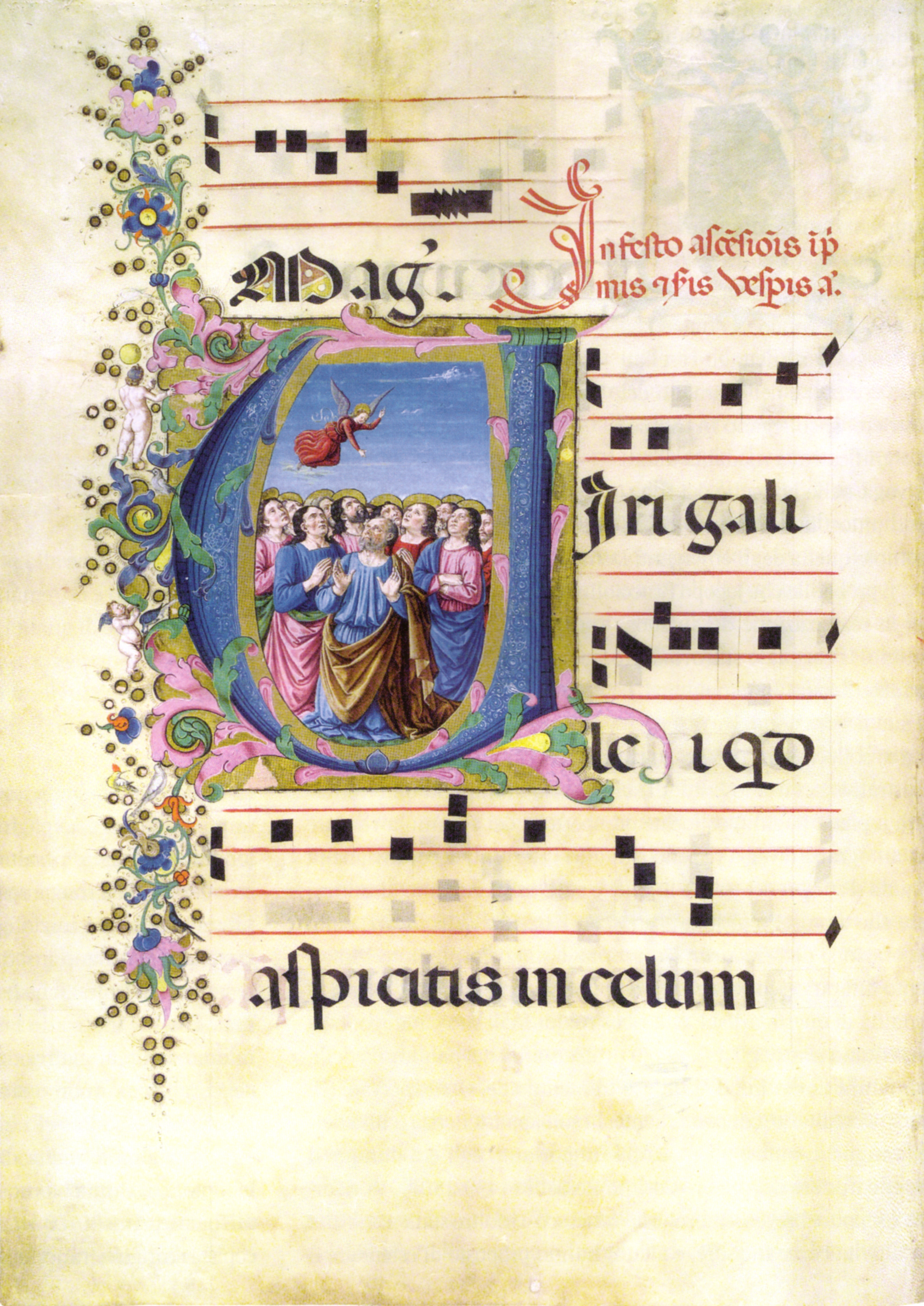 Bottega di domenico ghirlandaio, ascensione, antifonario edili 148 f. 47v. biblioteca medicea laurenziana